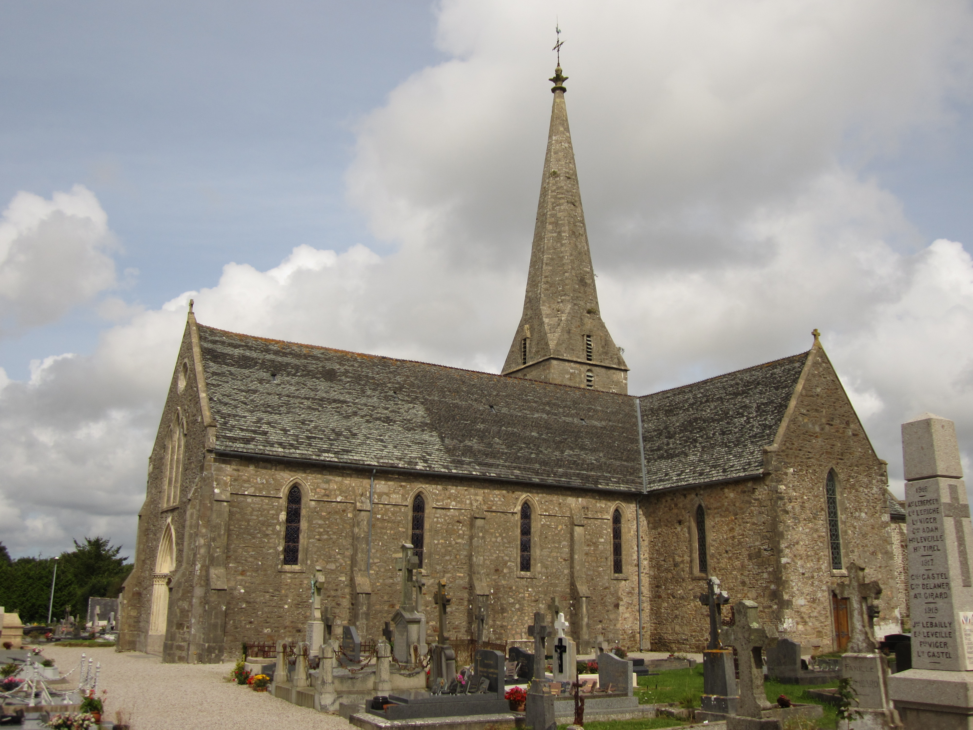 église Saint-Martin de Grosville